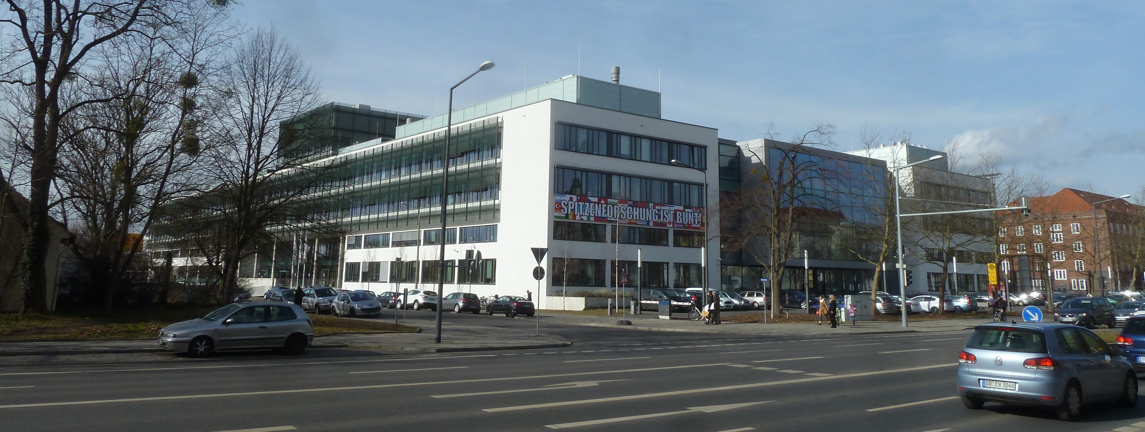 Zentrum für Regenerative Therapien Dresden am Tatzberg Ecke Fetscherstraße, der gut sichtbare Schriftzug „Spitzenforschung ist bunt!“ ist eine deutliche Entgegnung in Richtung Pegida.